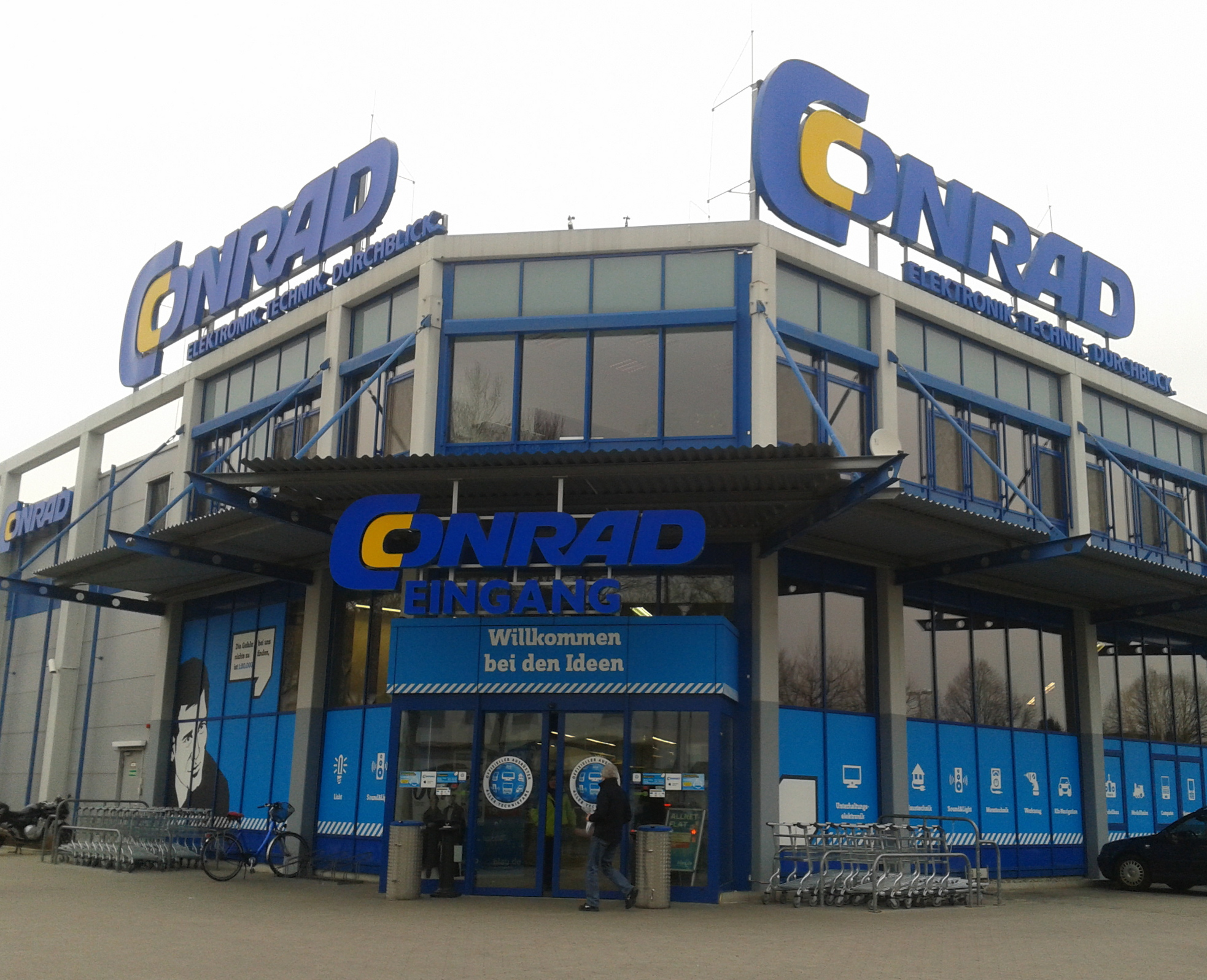 Conrad-Markt in Mannheim-Neckarau